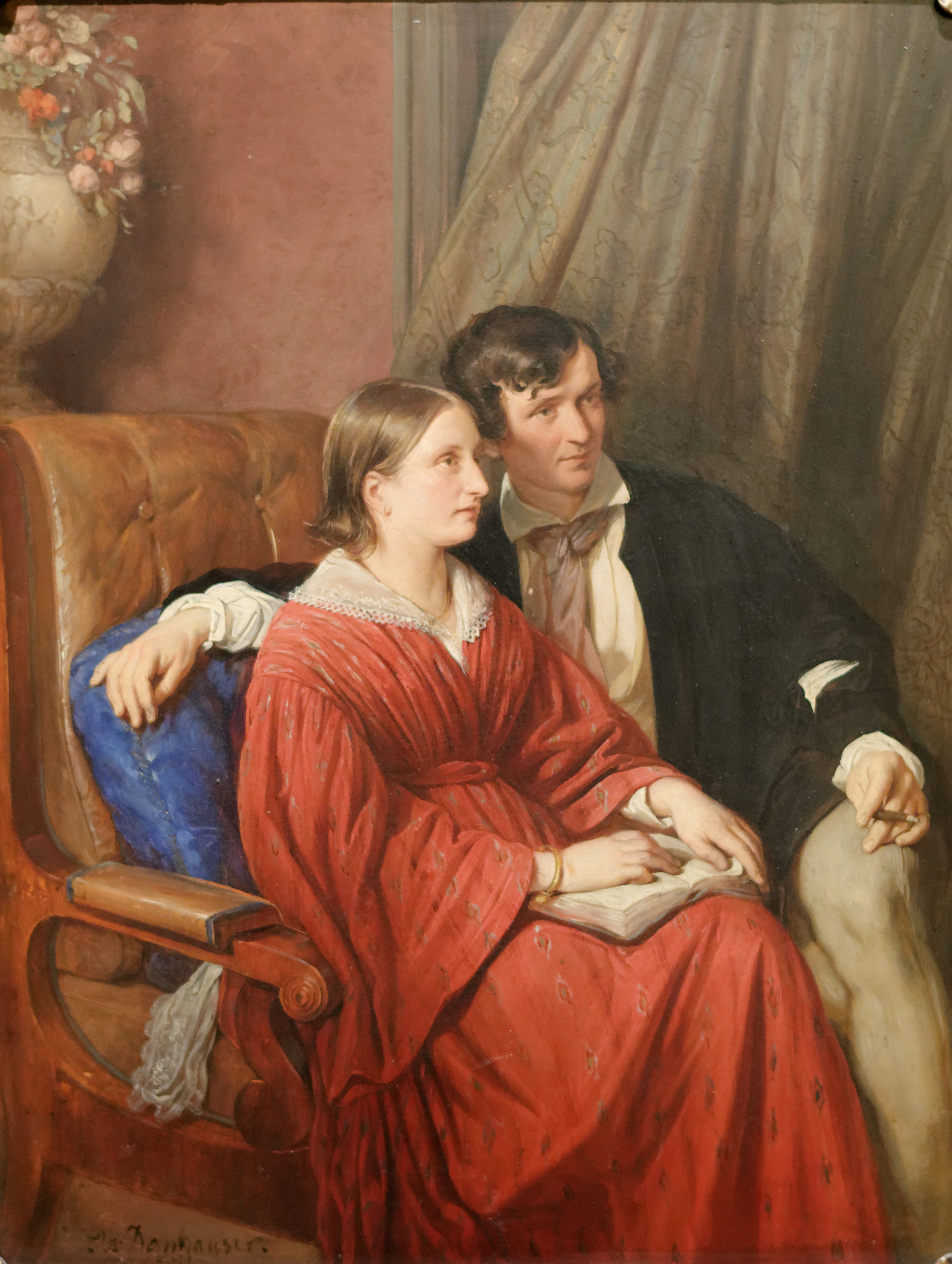 L'astronome Karl Ludwig von Littrow et sa femme Auguste née Bischoff (1841).title QS:P1476,fr:"L'astronome Karl Ludwig von Littrow et sa femme Auguste née Bischoff (1841)." label QS:Lfr,"L'astronome Karl Ludwig von Littrow et sa femme Auguste née Bischoff (1841)."